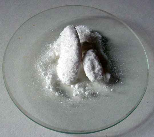 Na2WO4